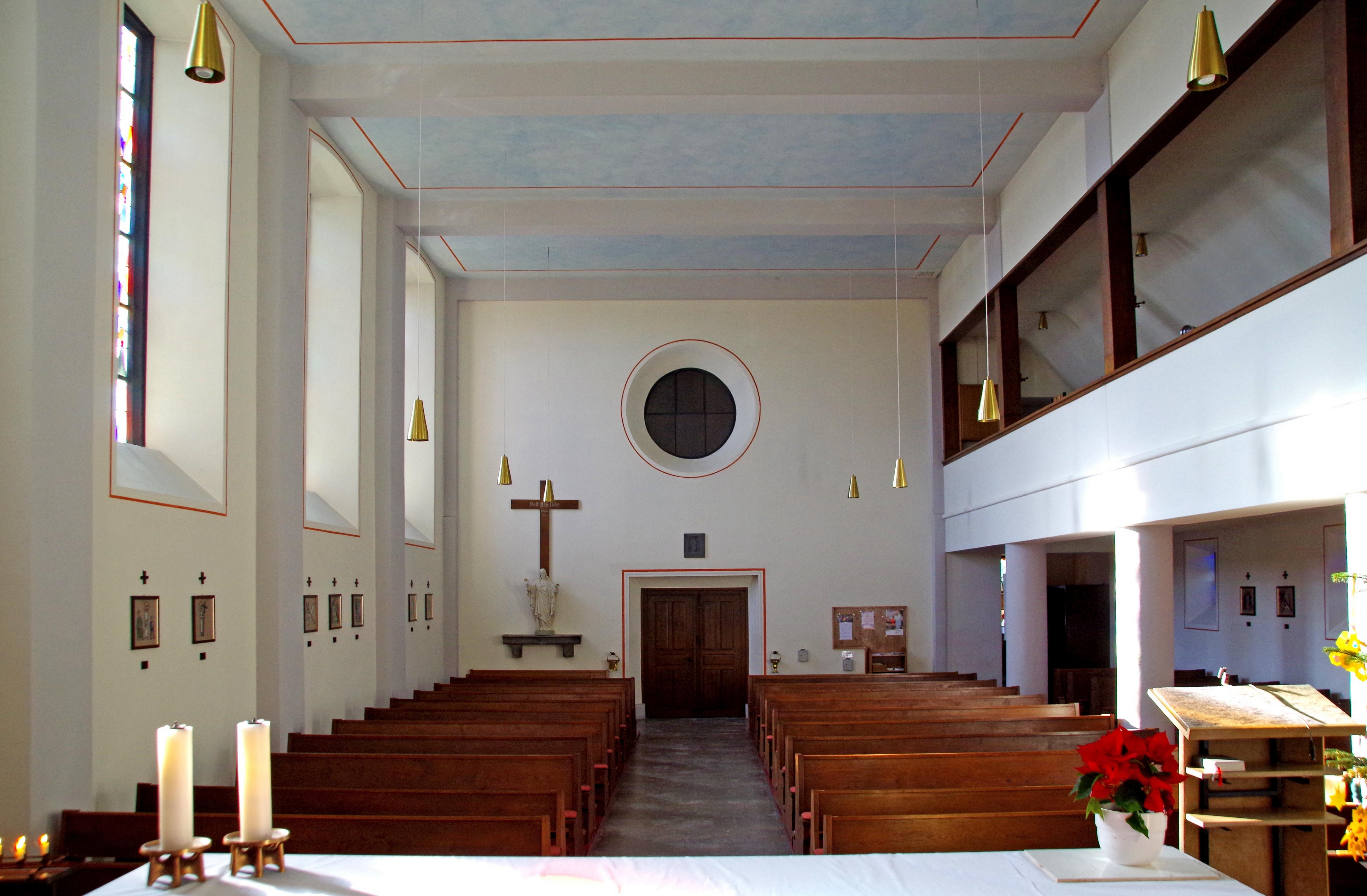 St. Cornelius (Rohren), Kirchenschiff, Blick vom Altar aus